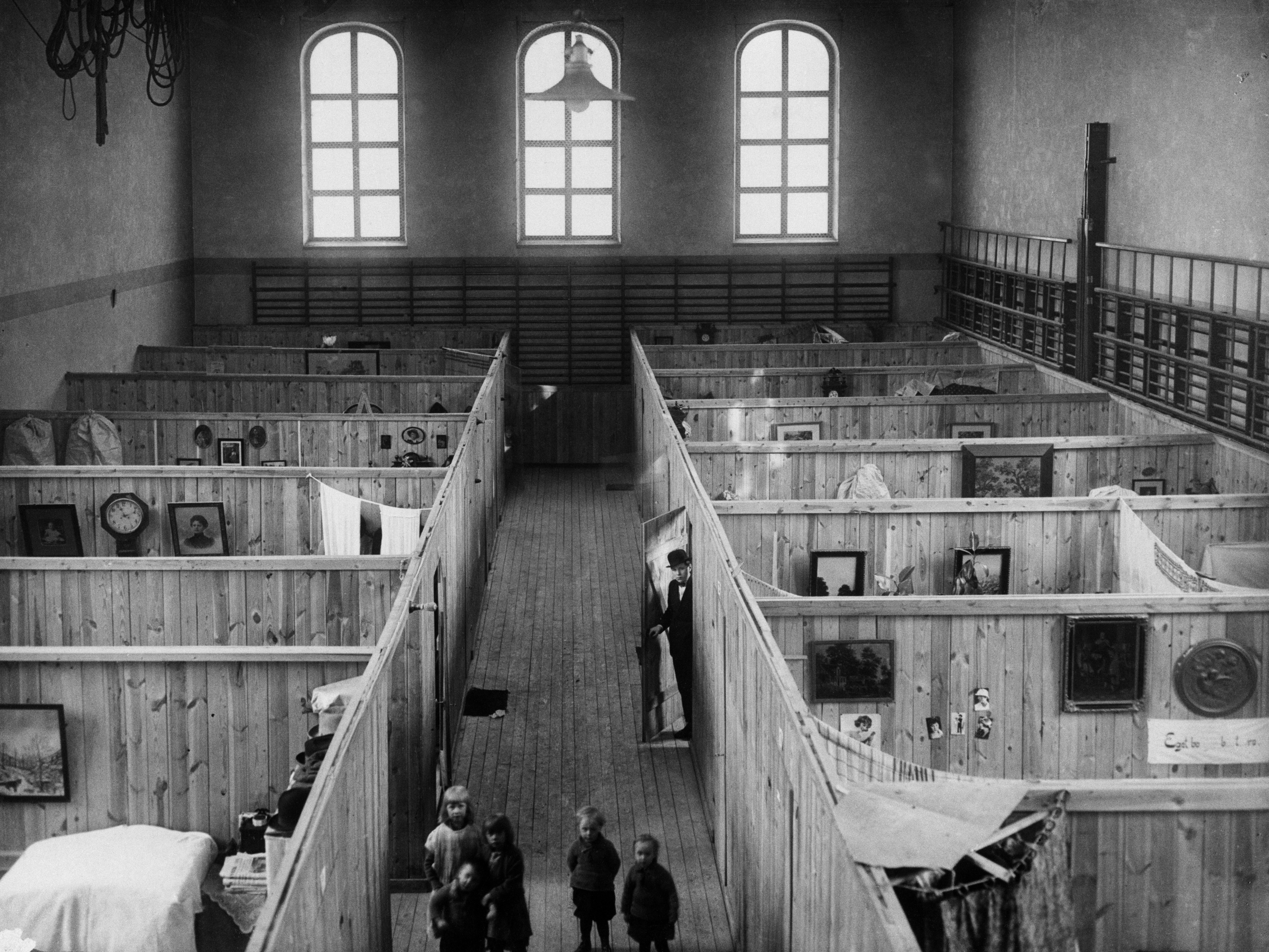 Nödbostäder, inkvartering i Polishusets gymnastiksal. Stockholm. Stockholms stadsmuseum F 83205